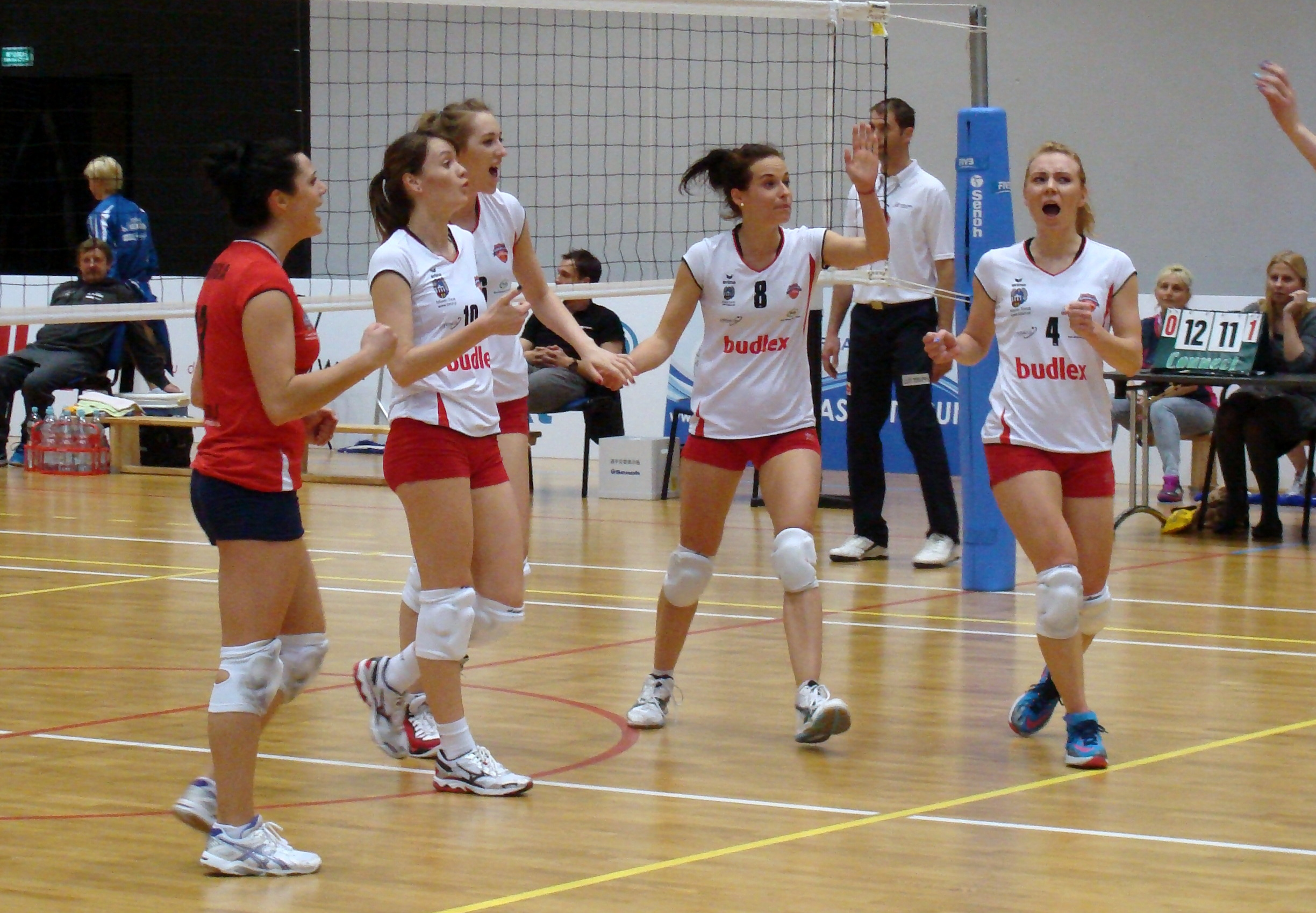 Zawodniczki Budowlanych Toruń (Daria Bąkowska, Ewelina Krzywicka, Anna Lewandowska, Aleksandra Theis (Gutkowska) i Marlena Pleśnierowicz) podczas meczu z Jokerem Świecie o III miejsce I ligi (2014/2015)